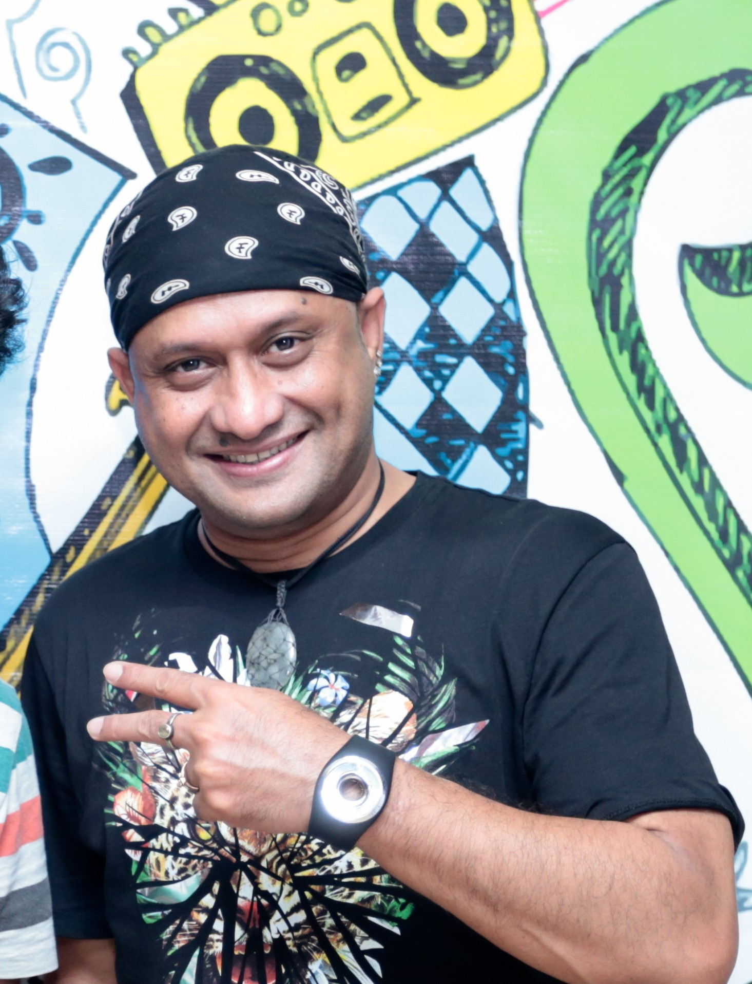 এস আই টুটুল একজন বাংলাদেশী গায়ক, সুরকার, গীতিকার ও অভিনয়শিল্পী।